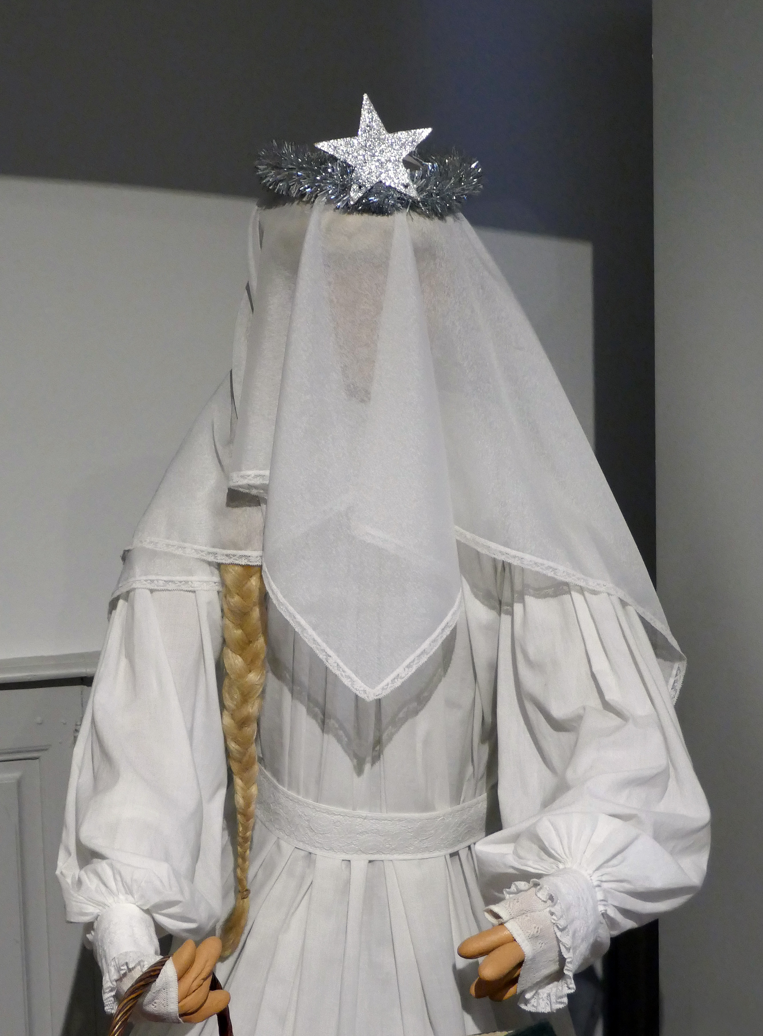 Représentation du Christkindl au Musée alsacien de Strasbourg. Exposition temporaire Costumes d'Alsace, étoffes d'un monde au Musée alsacien de Strasbourg (2018).